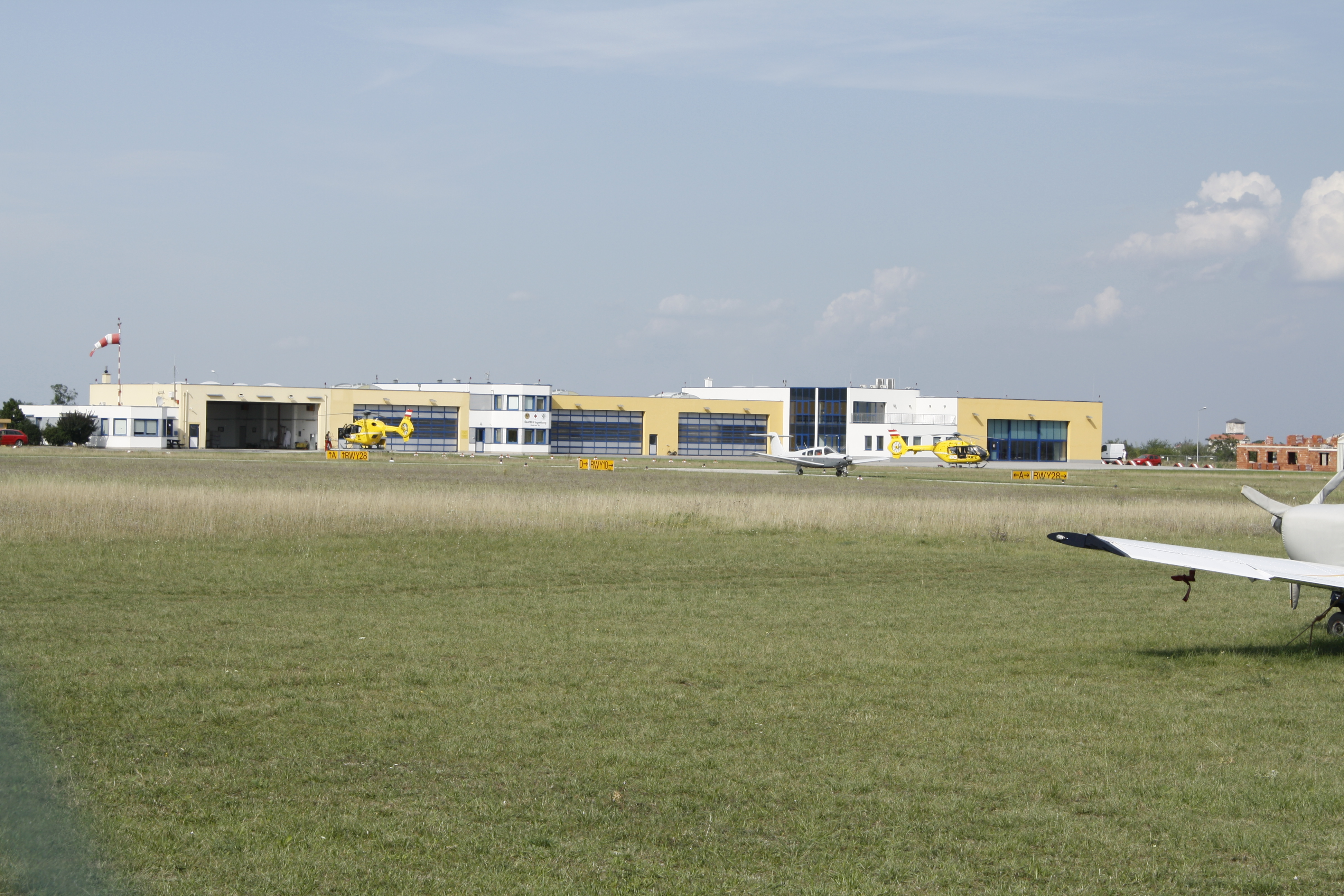 Christophorus 3 Flugrettung-Basis auf Flugplatz Wiener Neustadt LOAN